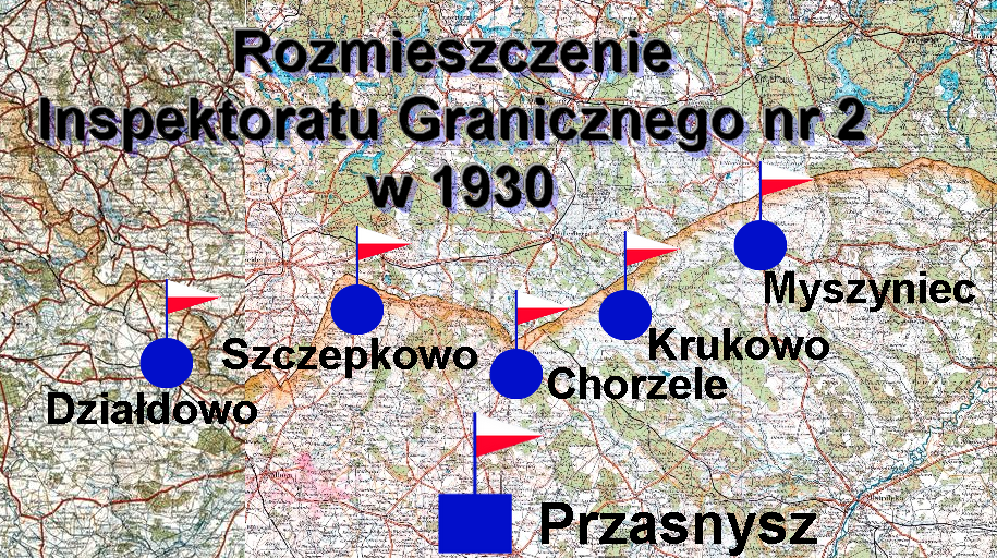 Rozmieszczenie inspektoratu Granicznego nr 2 Przasnysz w 1930 roku